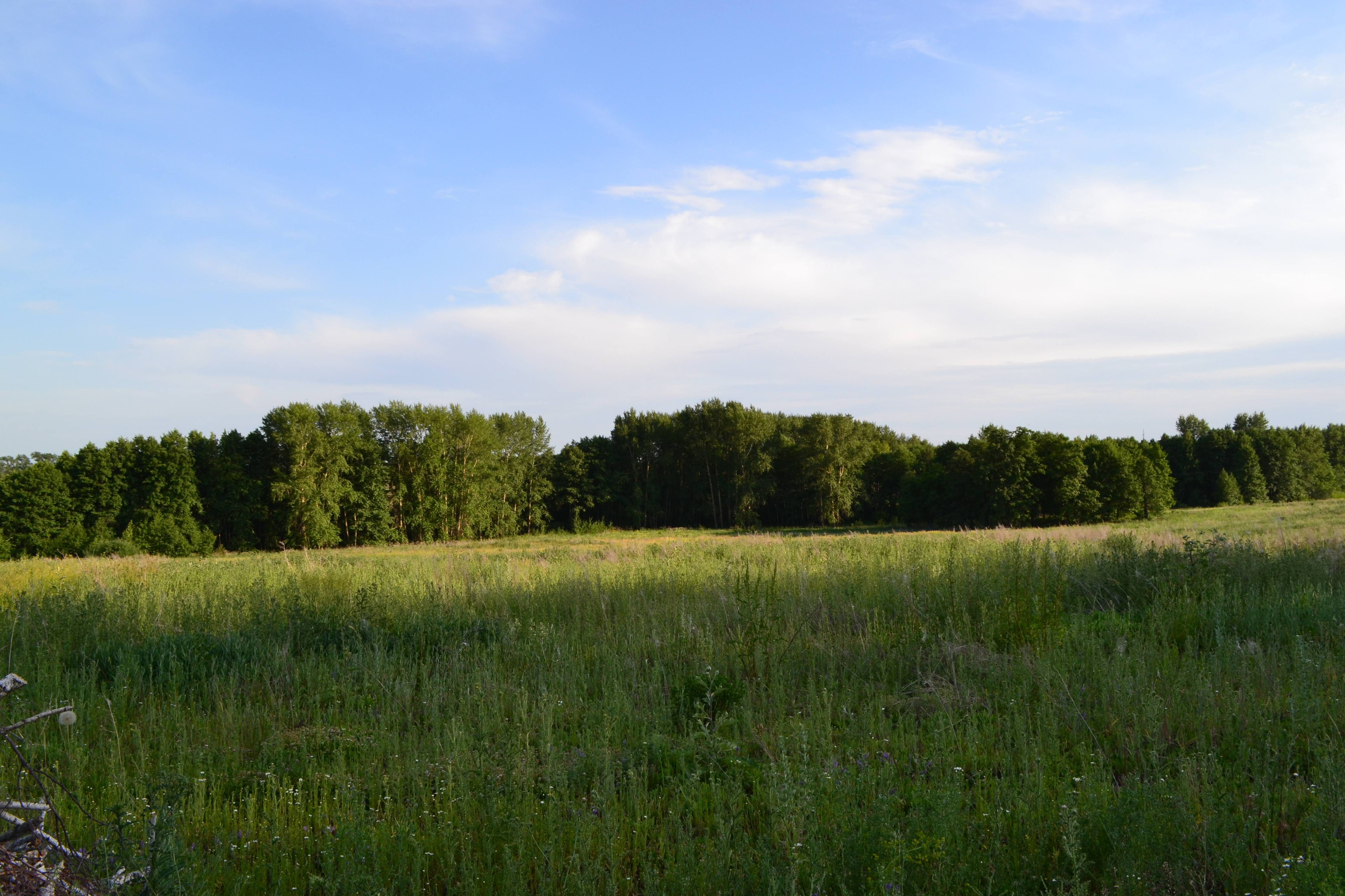 Владимирский склон (массив Актюбинский), Азнакаевский район This image is related to the protected area of Russia number 1610006